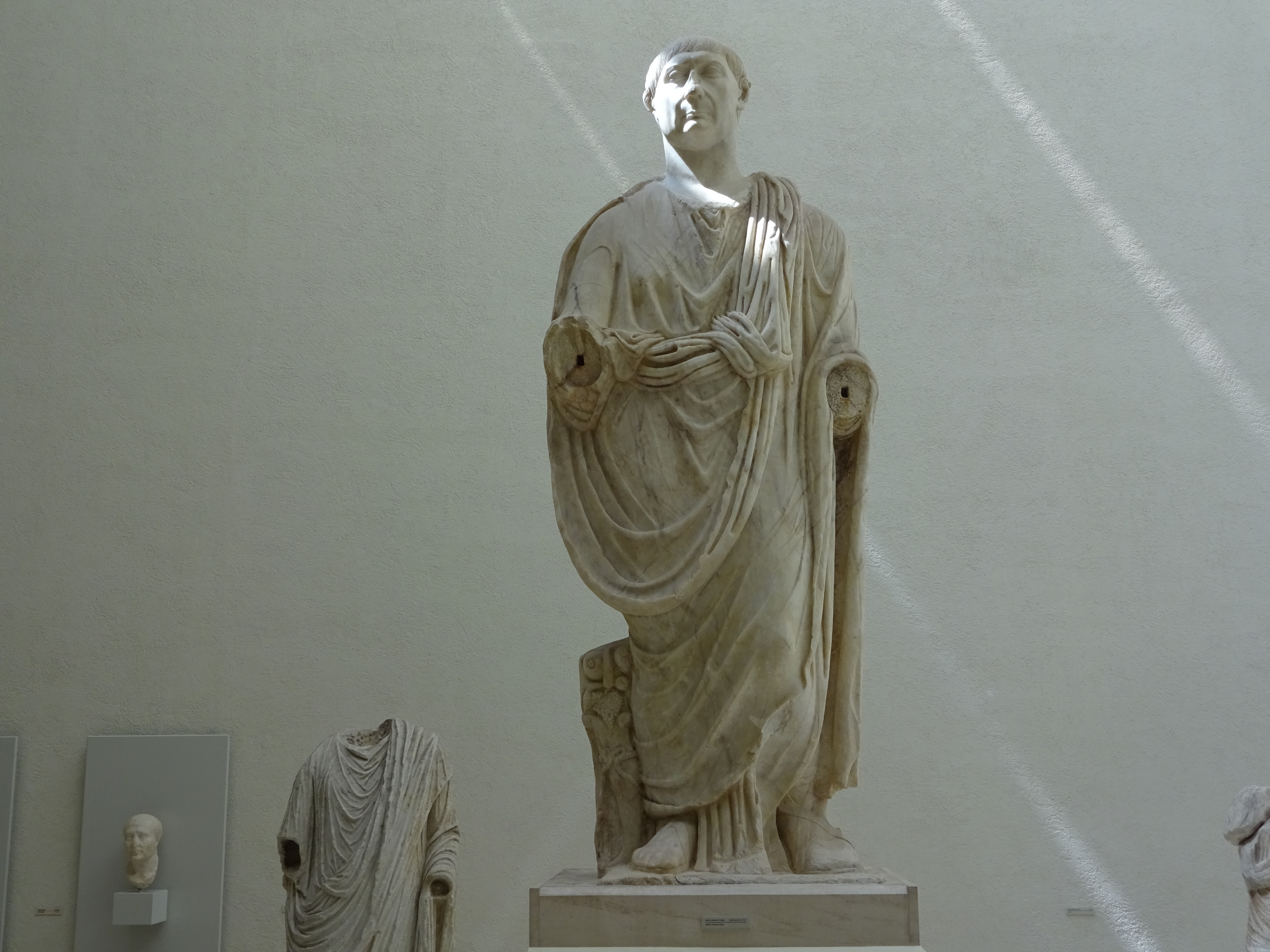 Statue des Trajan aus Baelo Claudia im Museum von Cadiz